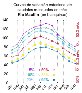 Curvas de variación estacional del río Maullín en Llanquihue. # Dirección General de Aguas # Diagnóstico y clasificación de los cursos y cuerpos de agua según objetivos de calidad. Cuenca del río Maullín. # Santiago de Chile # Ministerio de Obras Públicas (Chile) # 2004 # url: # urlarchivo: # Tabla 4.1: Río Maullín en Llanquihue (m3/s), pág.37 mes 5% 10% 20% 50% 85% 95% abr 79.27 72.97 66.40 56.49 47.68 43.68 may 86.63 79.93 72.95 62.40 53.03 48.78 jun 108.71 100.62 91.63 76.62 61.47 54.00 jul 118.19 111.19 103.26 89.65 75.33 68.01 ago 124.38 119.05 112.60 100.26 85.07 76.14 sep 128.04 122.56 115.92 103.23 87.61 78.43 oct 132.26 122.90 113.14 98.41 85.32 79.38 nov 127.48 118.02 108.14 93.23 79.99 73.98 dic 107.68 103.34 98.09 88.04 75.67 68.40 ene 99.78 94.13 87.71 76.63 64.90 58.86 feb 88.17 83.81 78.52 68.42 55.99 48.68 mar 80.44 76.30 71.28 61.68 49.86 42.92 This plot was created with Gnuplot.